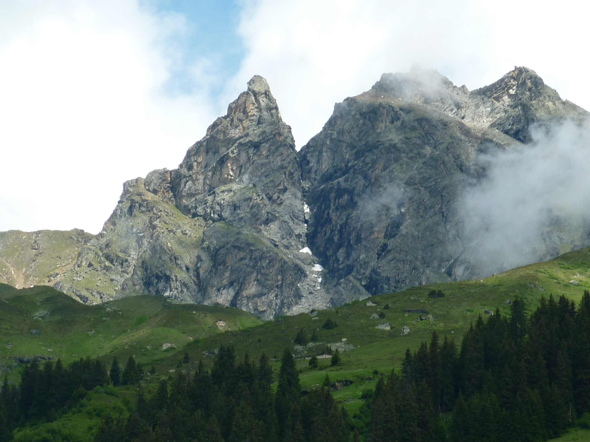 Fergenkegel, Klosters GR; Schweiz